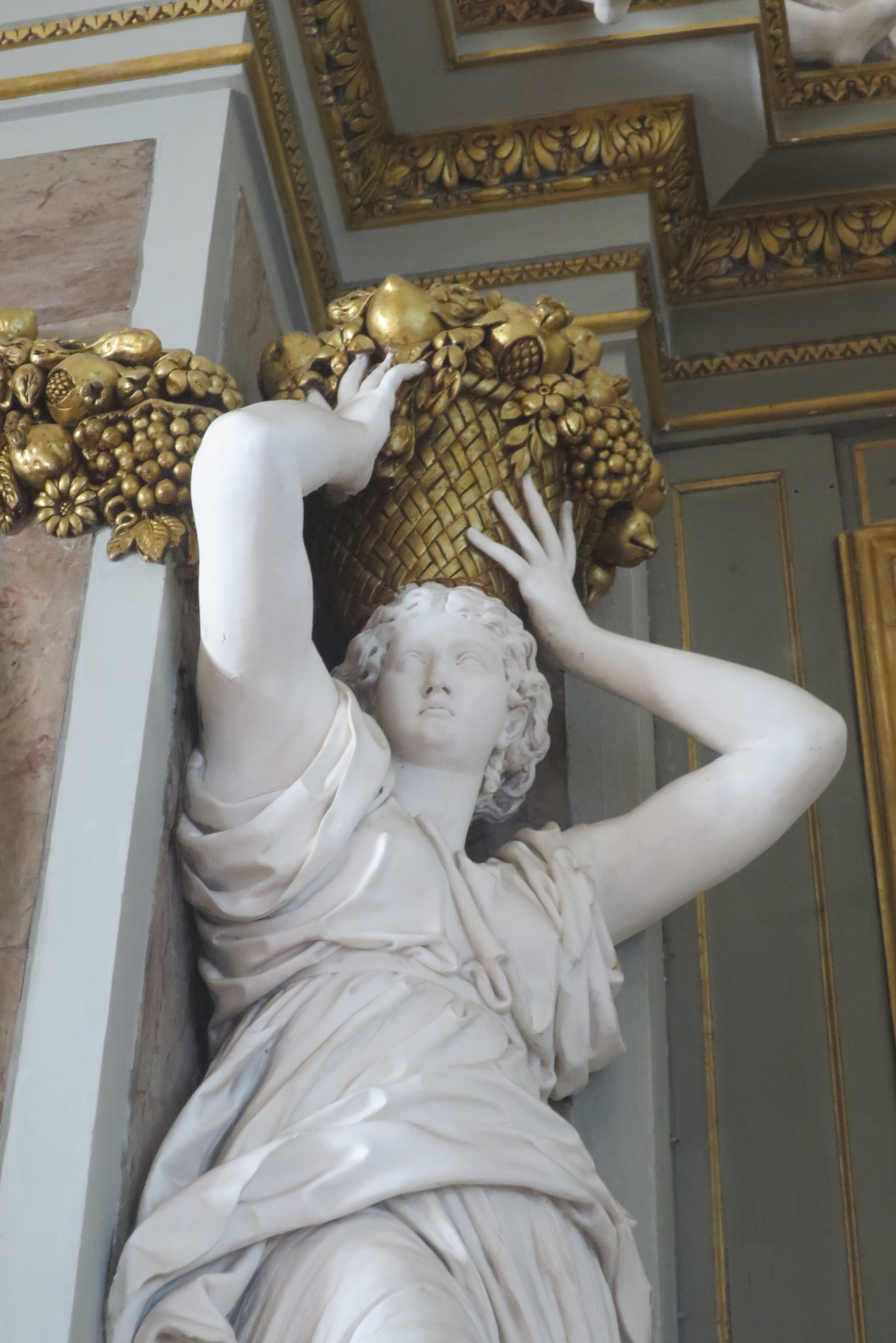 Détail d'une des canéphores de la cheminée de la grande salle du château de Maisons à Maisons Lafittes